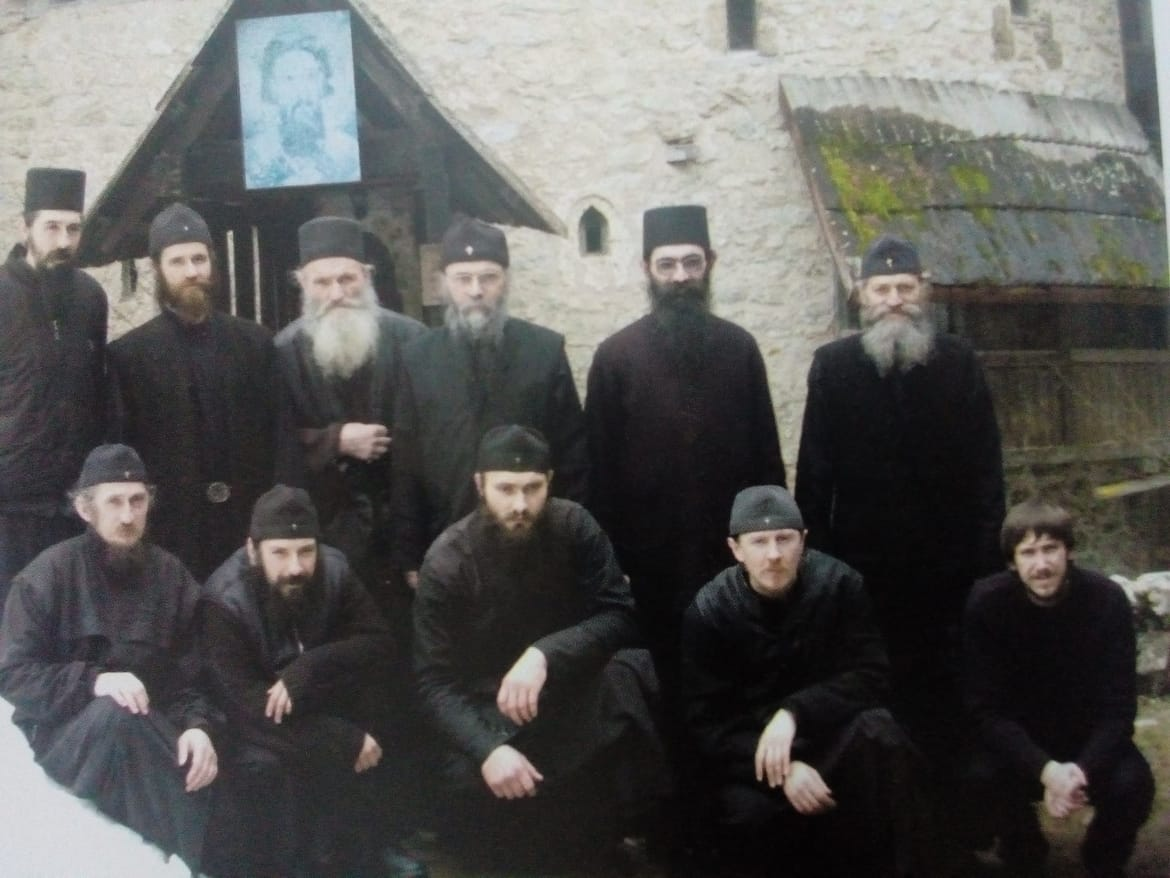 Црноречко братство у време игумана Николаја